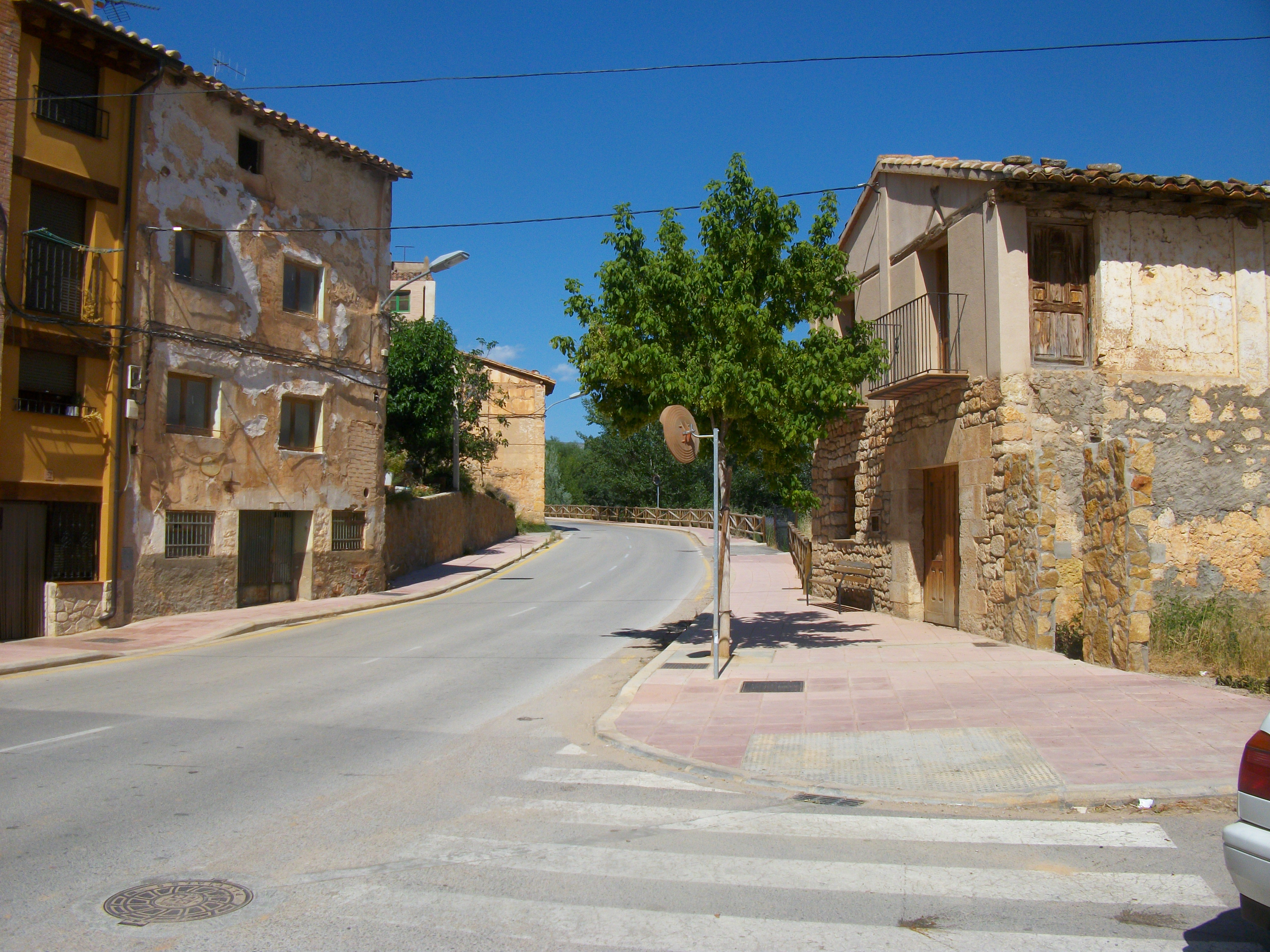 Vista general